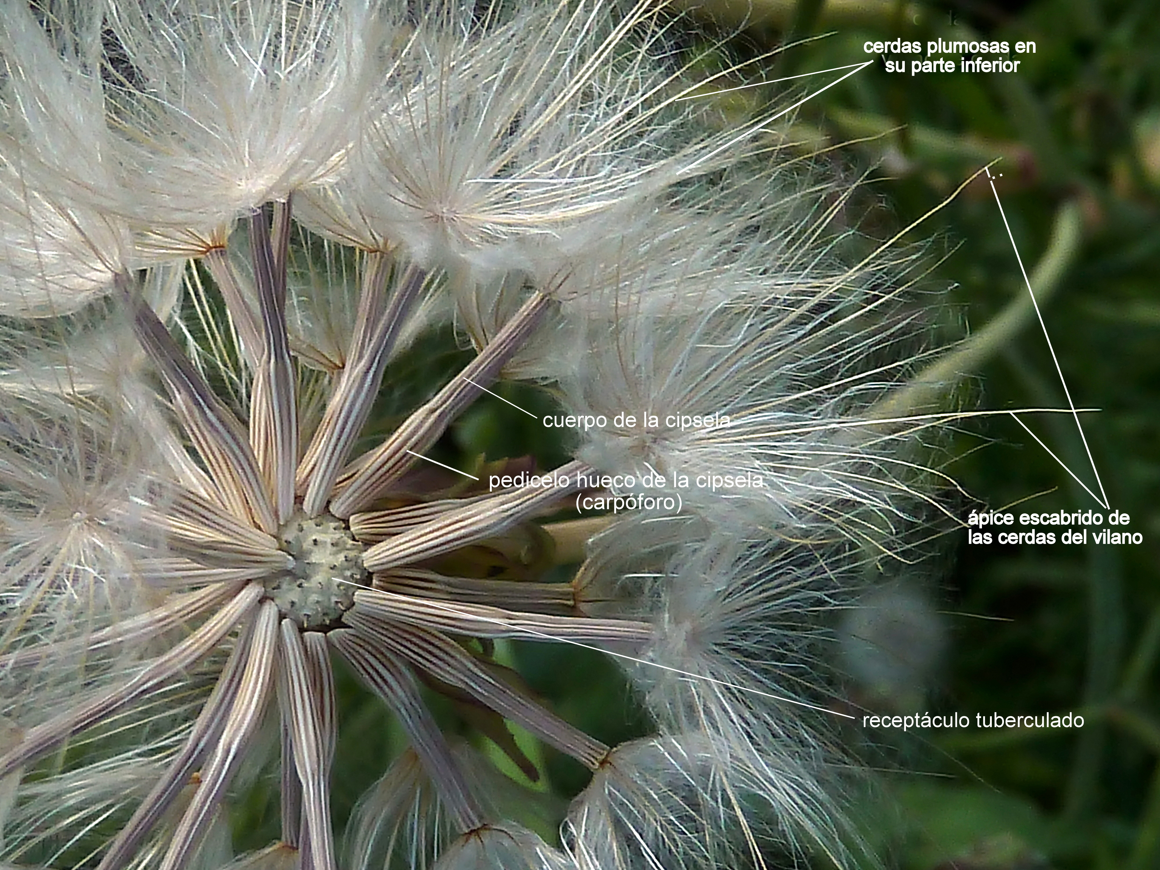 Podospermum laciniatum (teta de vaca, barbajas, ...) - Anatomía del receptáculo y de las cipselas. - Camino de la Azarbe de Patricio, Albatera (Provincia de Alicante, España).